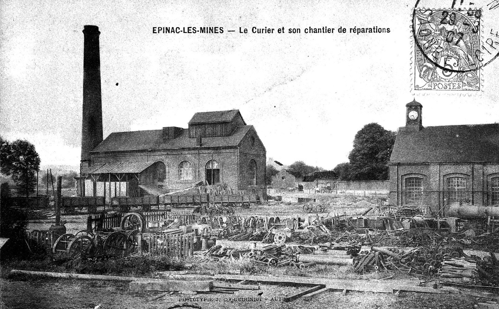 Le puits Curier des houillères d'Epinac.